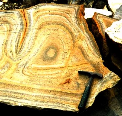 Liesegangsche Ringe in einem Sandstein - etwas digital bearbeitete Version, um den Kontrast der Ringe besser heraus zu bringen